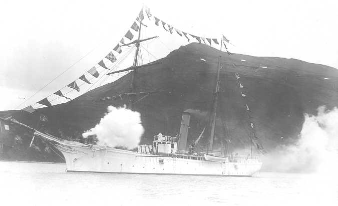 USRC Richard Rush, "Sitka, 7-4-1901"